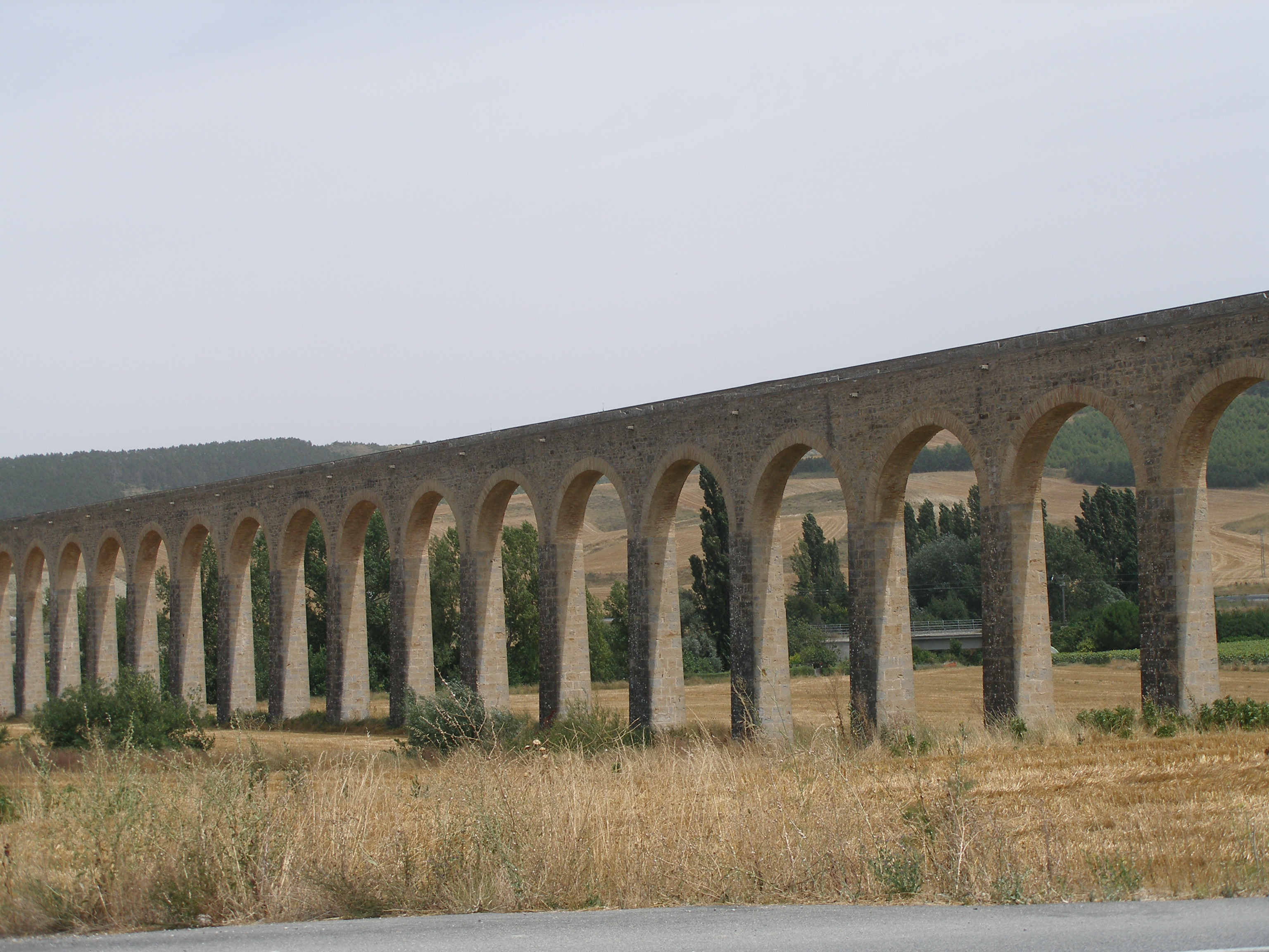 Noain